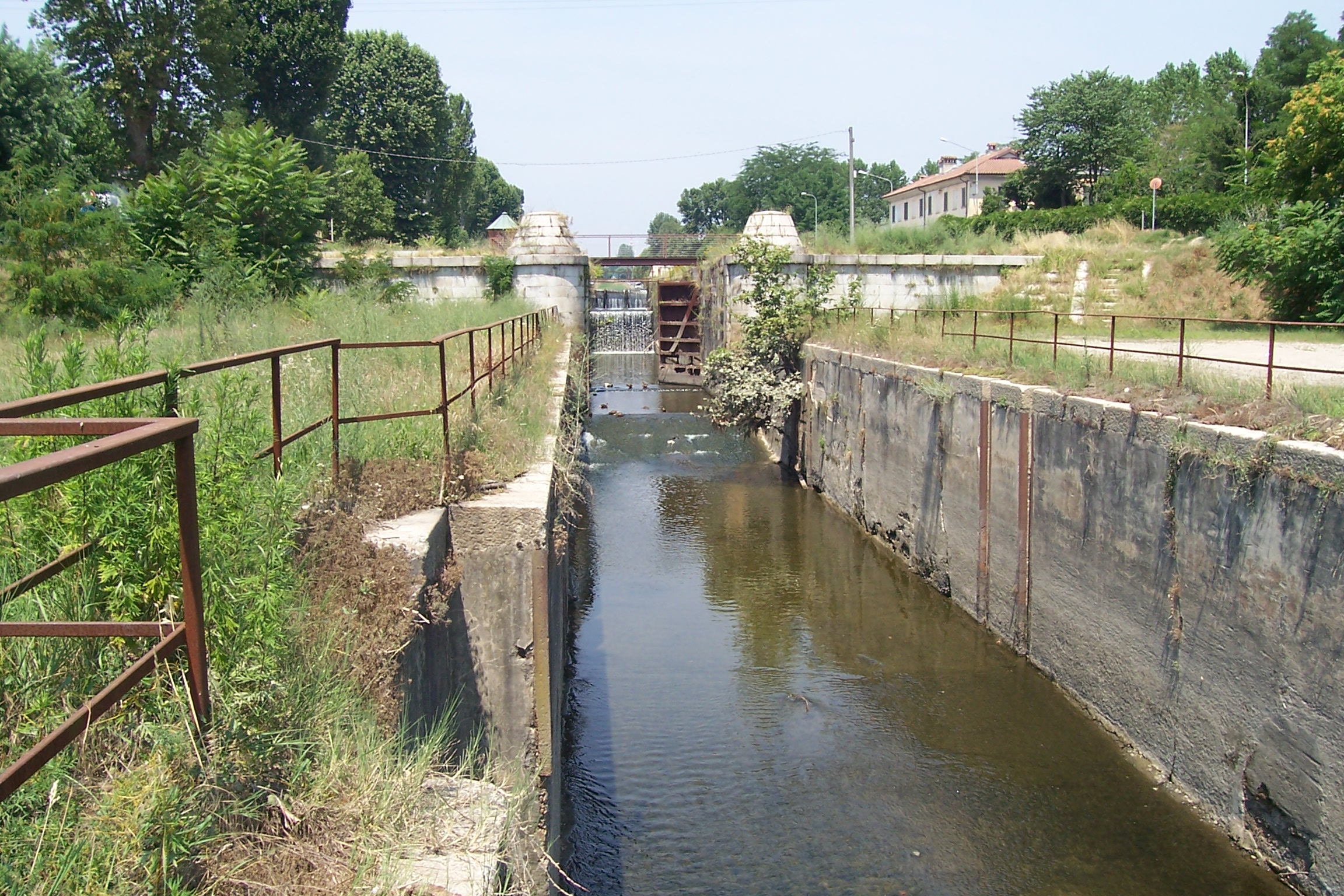 Pavia , L'ultima Conca del Naviglio Pavese